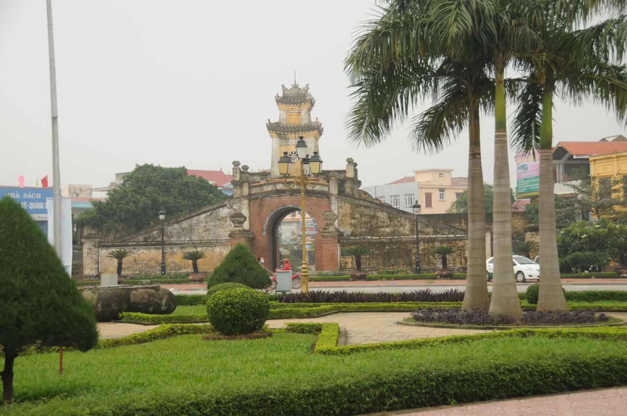 Cổng thành cổ Quảng Bình